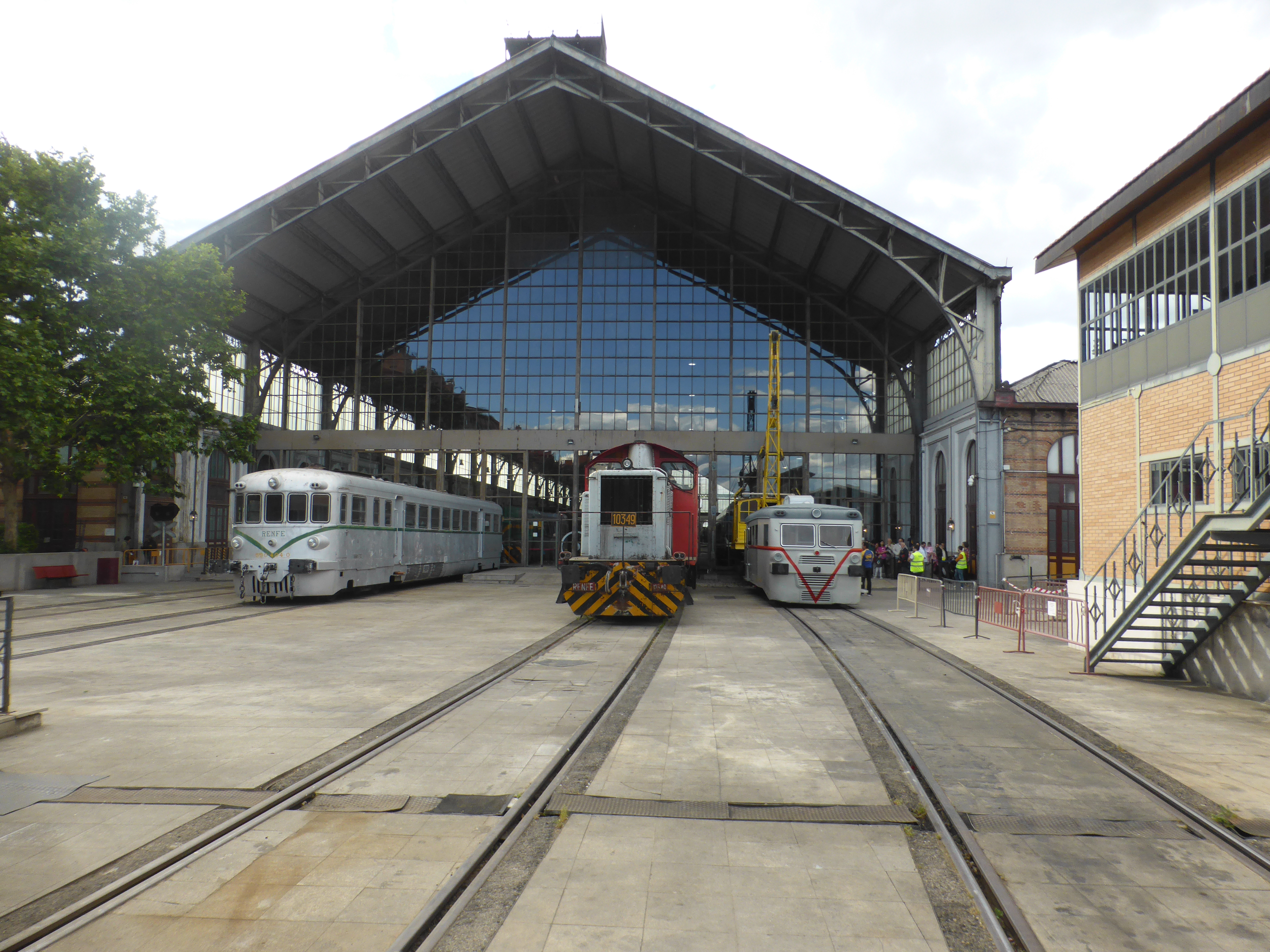 El "Museo del Ferrocarril de Madrid" se encuentra en la antigua estación ferroviaria de Madrid-Delicias. Inicialmente se llamaba "Museo Nacional Ferroviario". Conserva locomotoras de vapor, diésel y eléctricas, automotores, coches de viajeros y otros vehículos ferroviarios históricos.